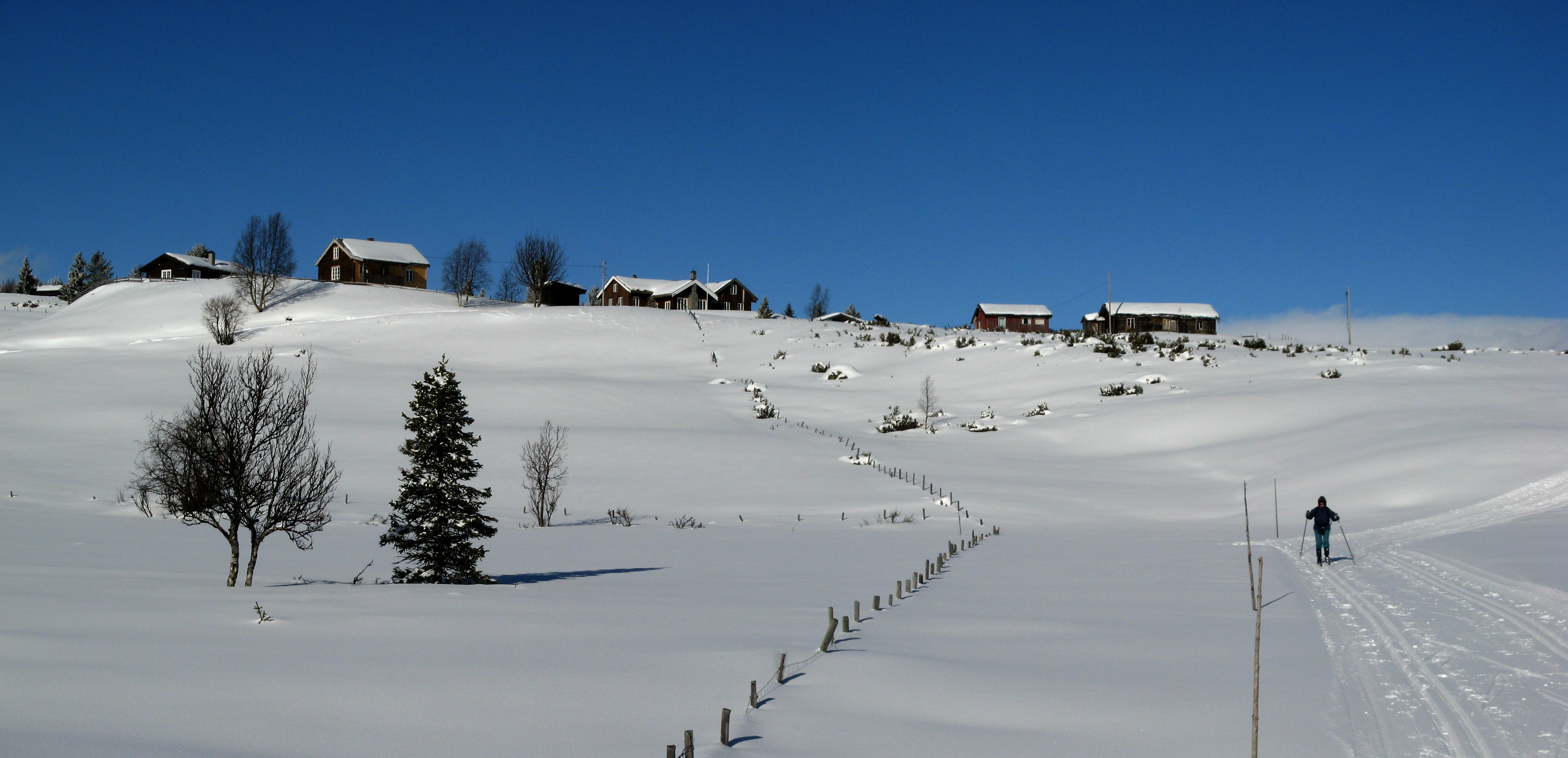 Kamben på Gol